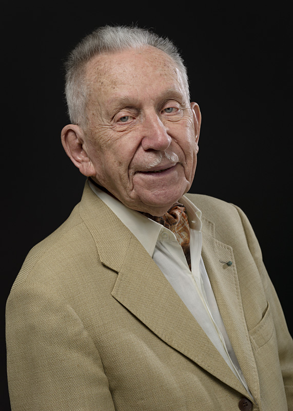 Julien-François Zbinden, pianiste et compositeur, né à Rolle le 11 novembre 1917. Portrait réalisé à la BCU Lausanne, le 29 janvier 2015.